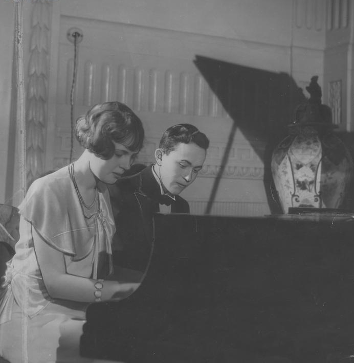 Jan Ekier with his sister Halina Ekier; Koncert fortepianowy Jana Ekiera i Haliny Ekier podczas wieczoru artystycznego u hrabiny Potockiej